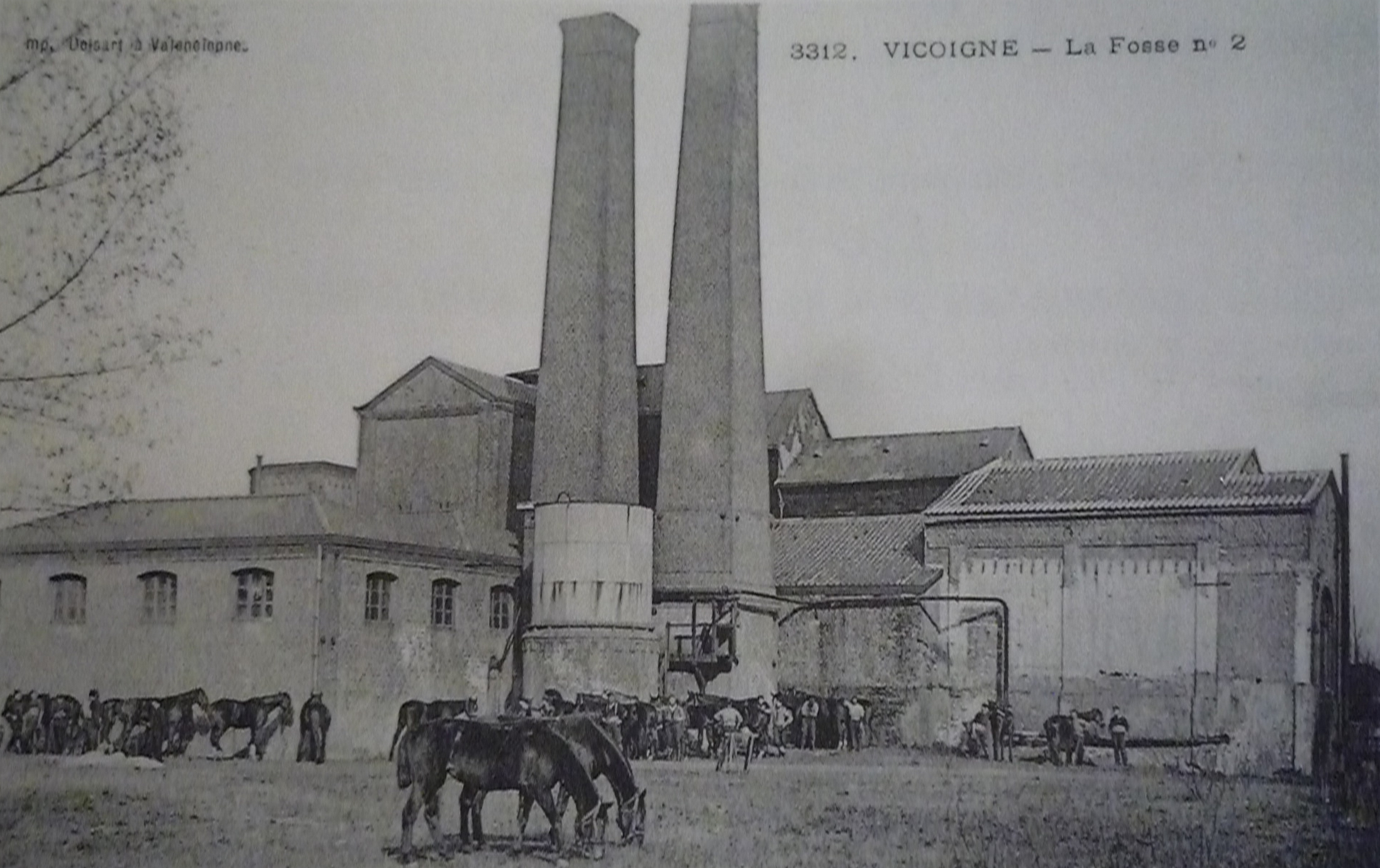 La fosse n° 2 ou Évrard de la Compagnie des mines de Vicoigne était un charbonnage constitué d'un seul puits situé à Raismes, Nord, Nord-Pas-de-Calais, France.